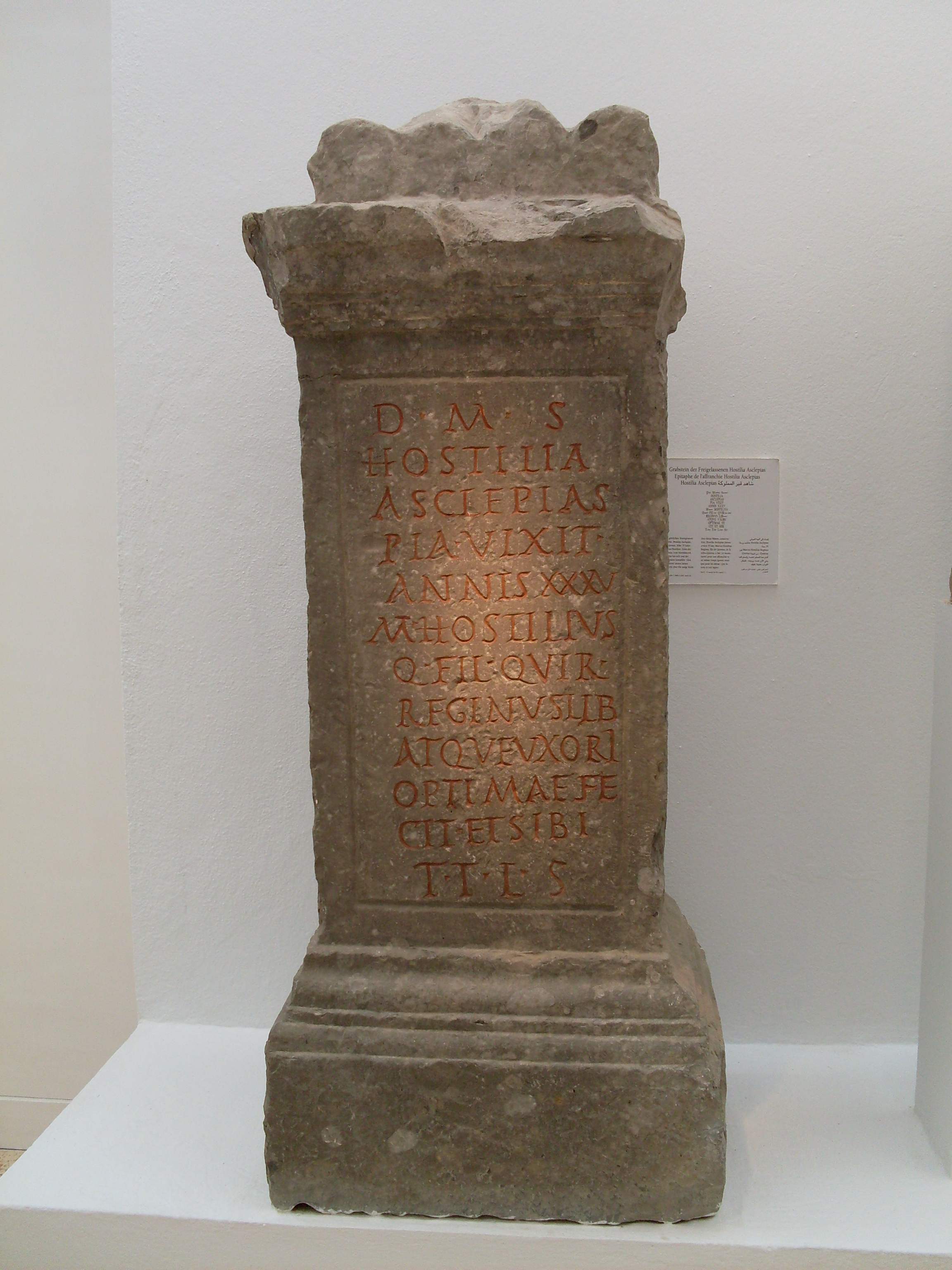 Stèle funéraire au musée archéologique de Chemtou, Chemtou, Gouvernerat de Jendouba, Tunisie